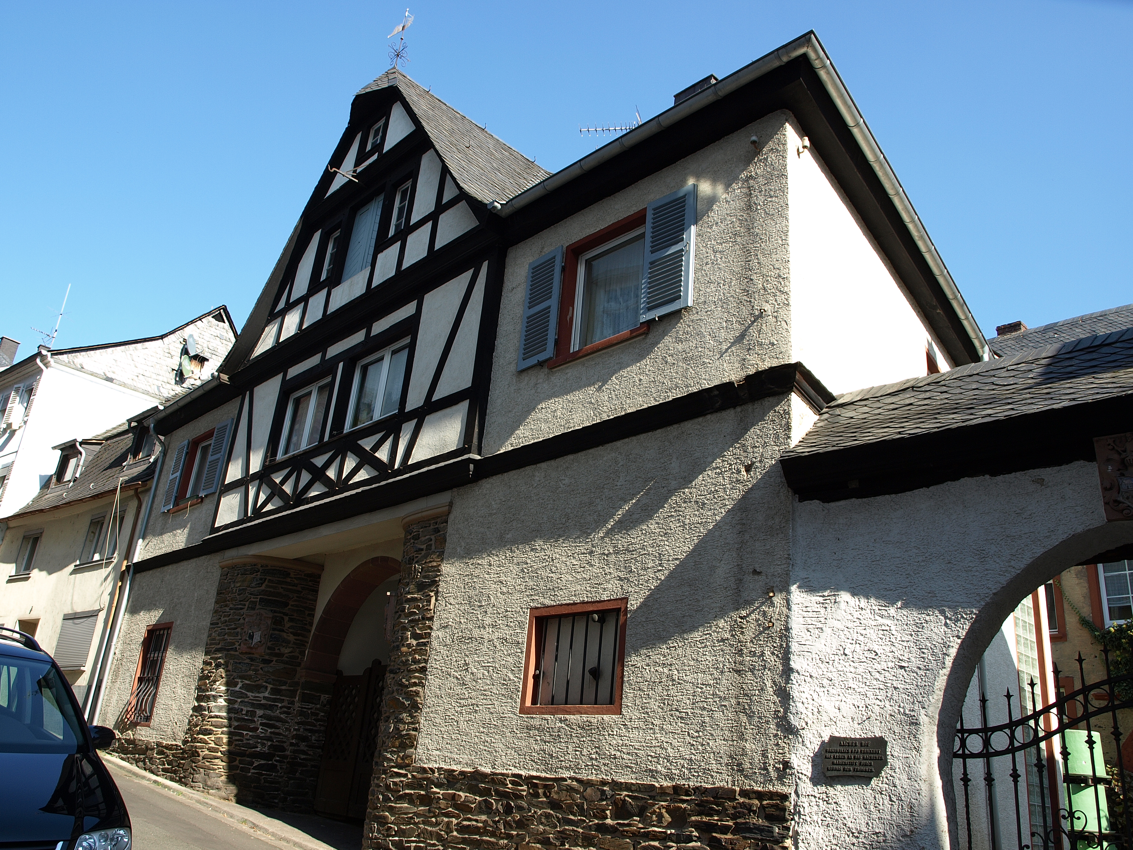 Traben-Trarbach - Aacher Hof, Gesamtansicht - Inhalt der Gedenktafel: Aacher Hof - urkundlich 830 erwähnt als Lehen an das Aachener Marienstift durch Ludwig den Frommen